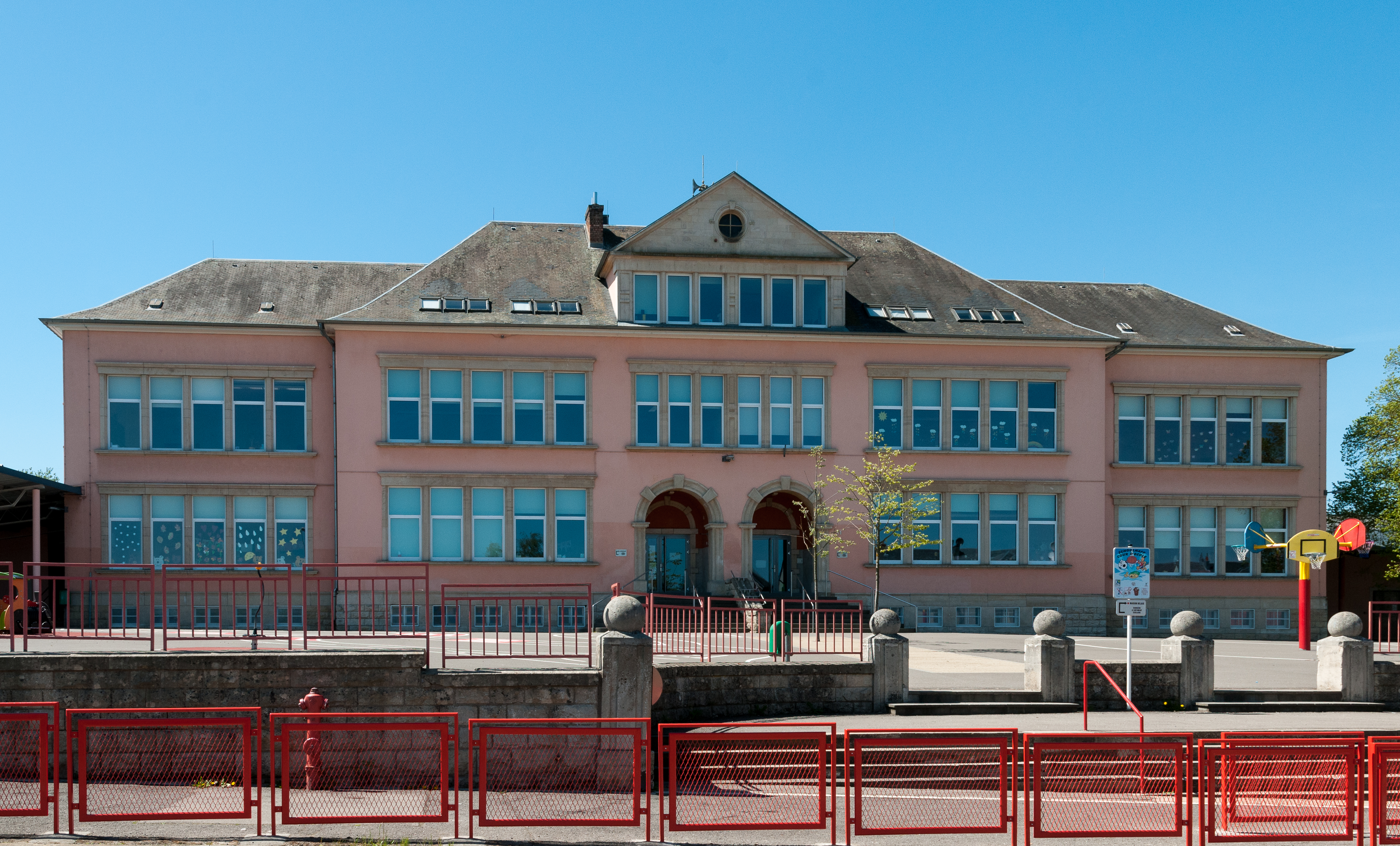 D'Schoulgebai zu Butschebuerg.